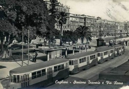 Cagliari - Capolinea tranviario davanti alla stazione FS.